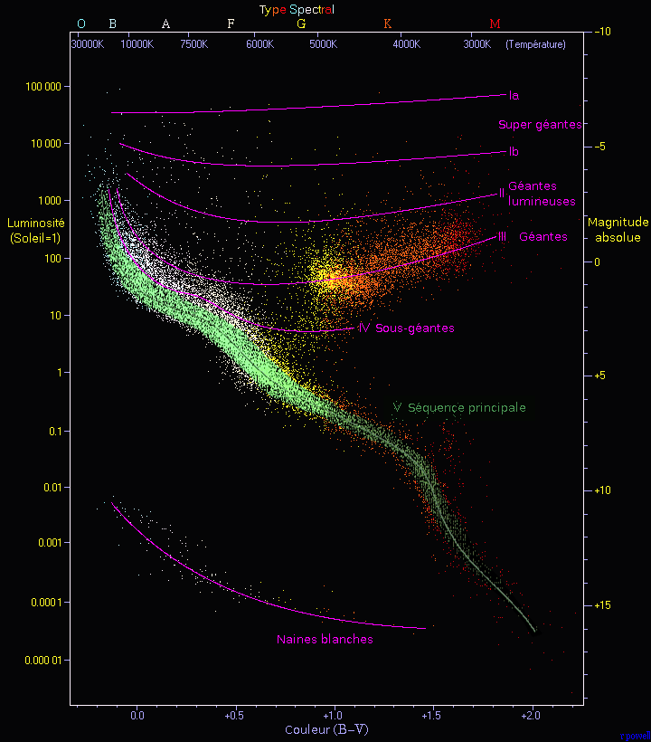 DIagramme HR avec mise en évidence par une couleur neutre de la séquence principale